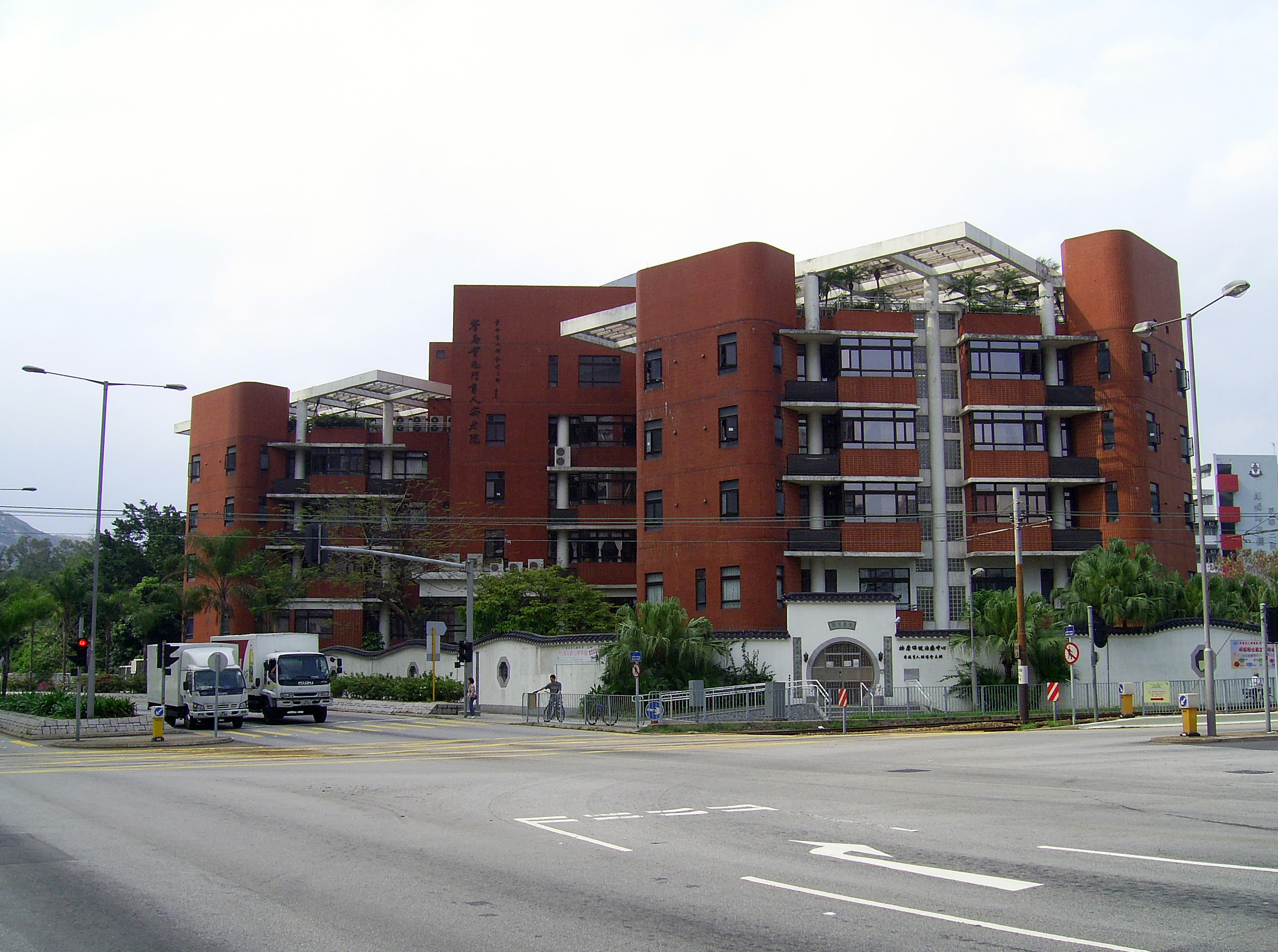 中文（香港）: 賽馬會屯門盲人安老院